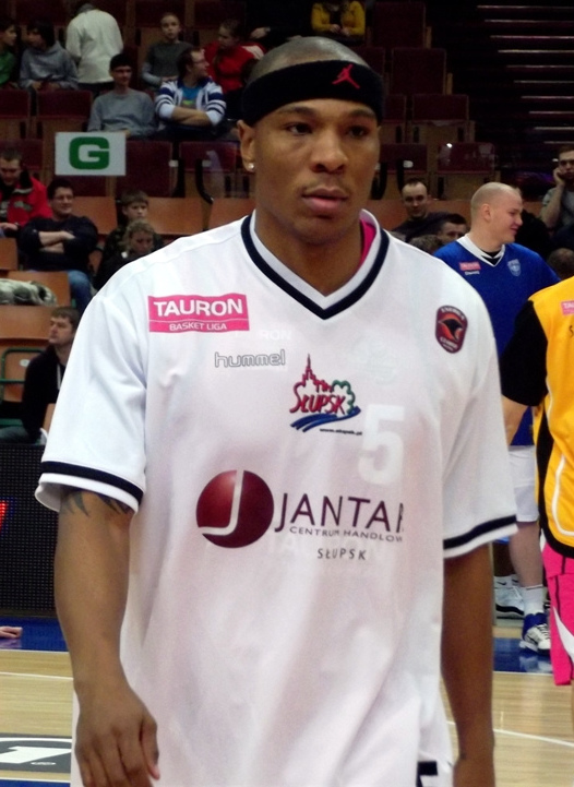 Zdjęcie zrobione podczas meczu gwiazd PLK w katowickim Spodku.